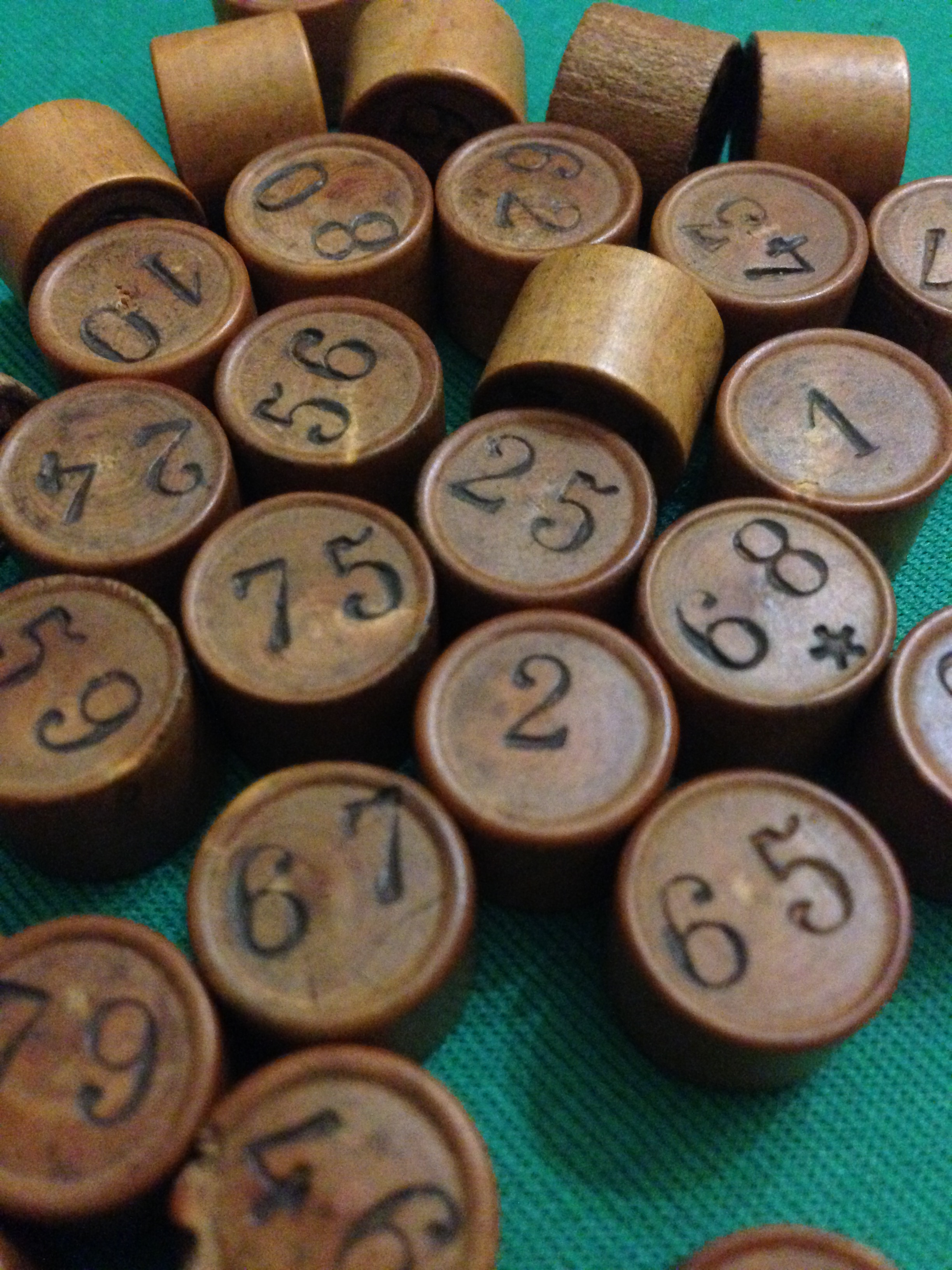 Antichi numeri in legno della tombola napoletana